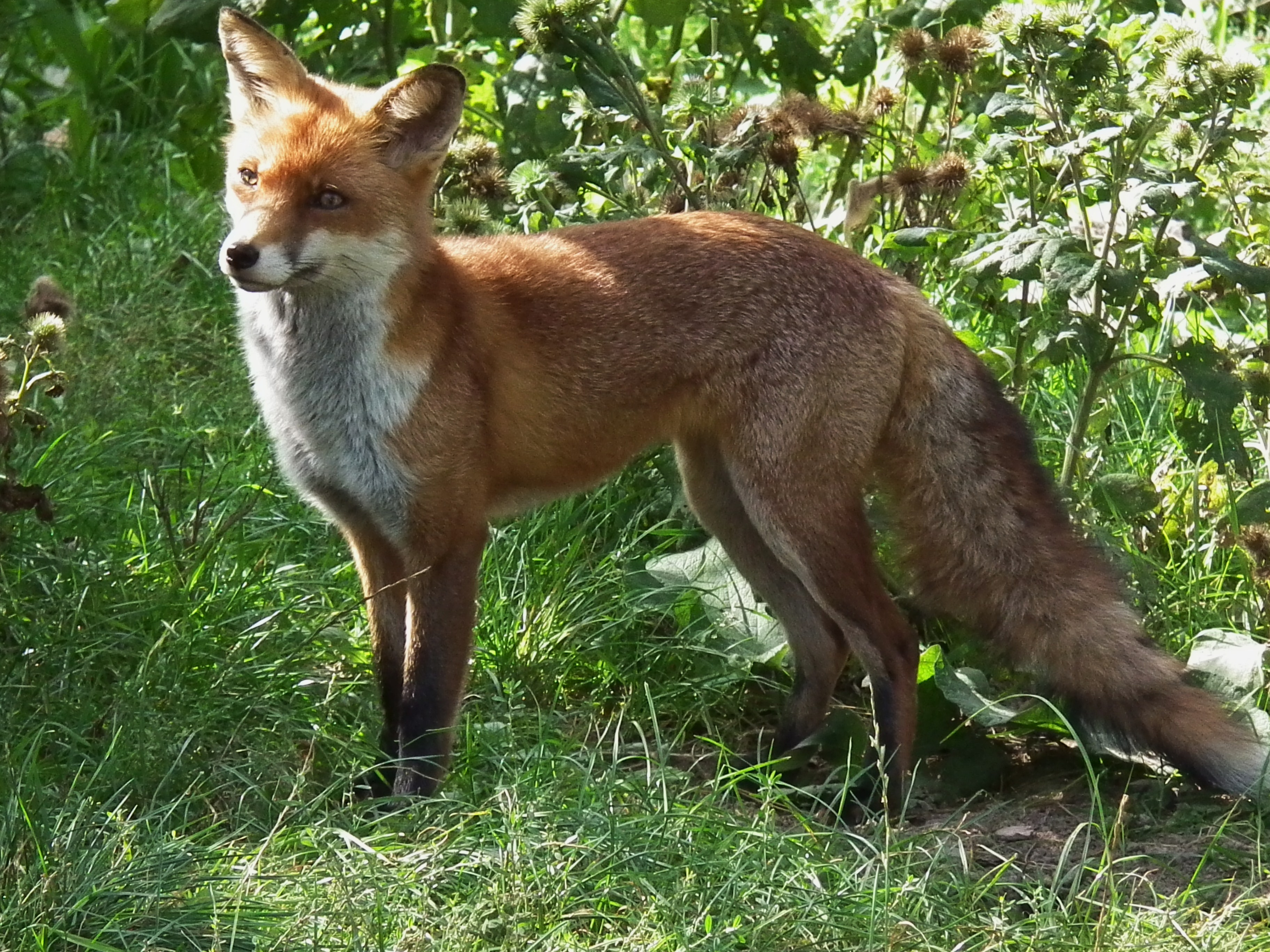 Rotfuchs (Vulpes vulpes) im Tiergarten Worms (Rheinland-Pfalz, Deutschland)